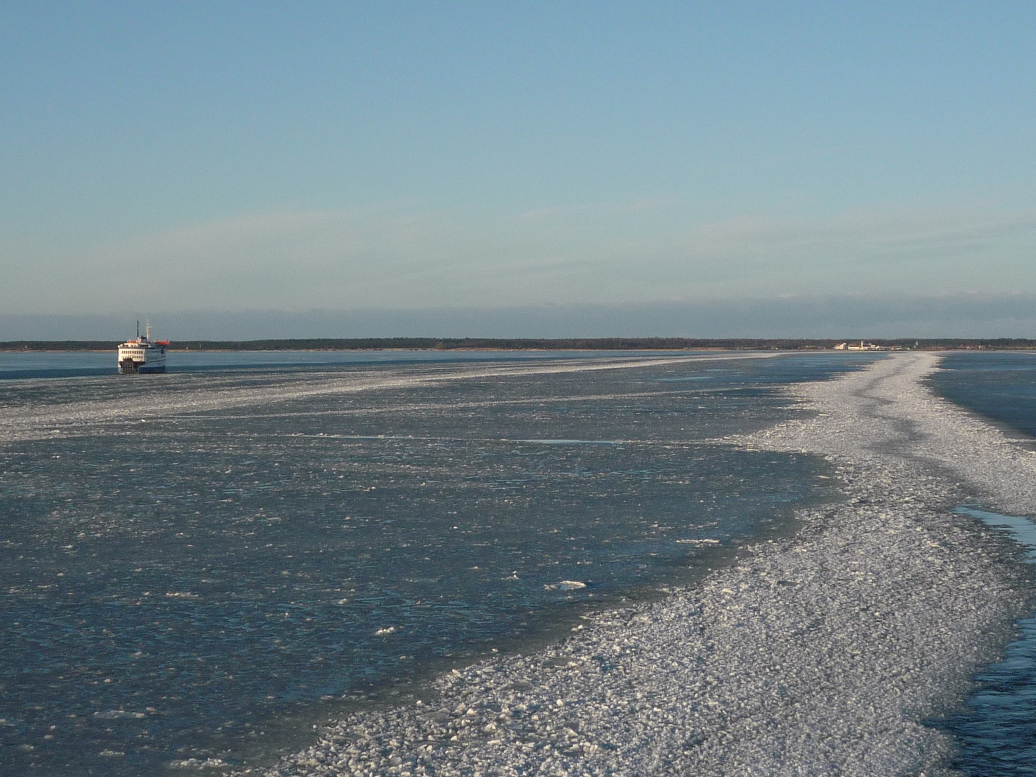 Virtsu–Kuivastu laevatee. Vaade Kuivastu poole, vasakul Regula. Suur väin